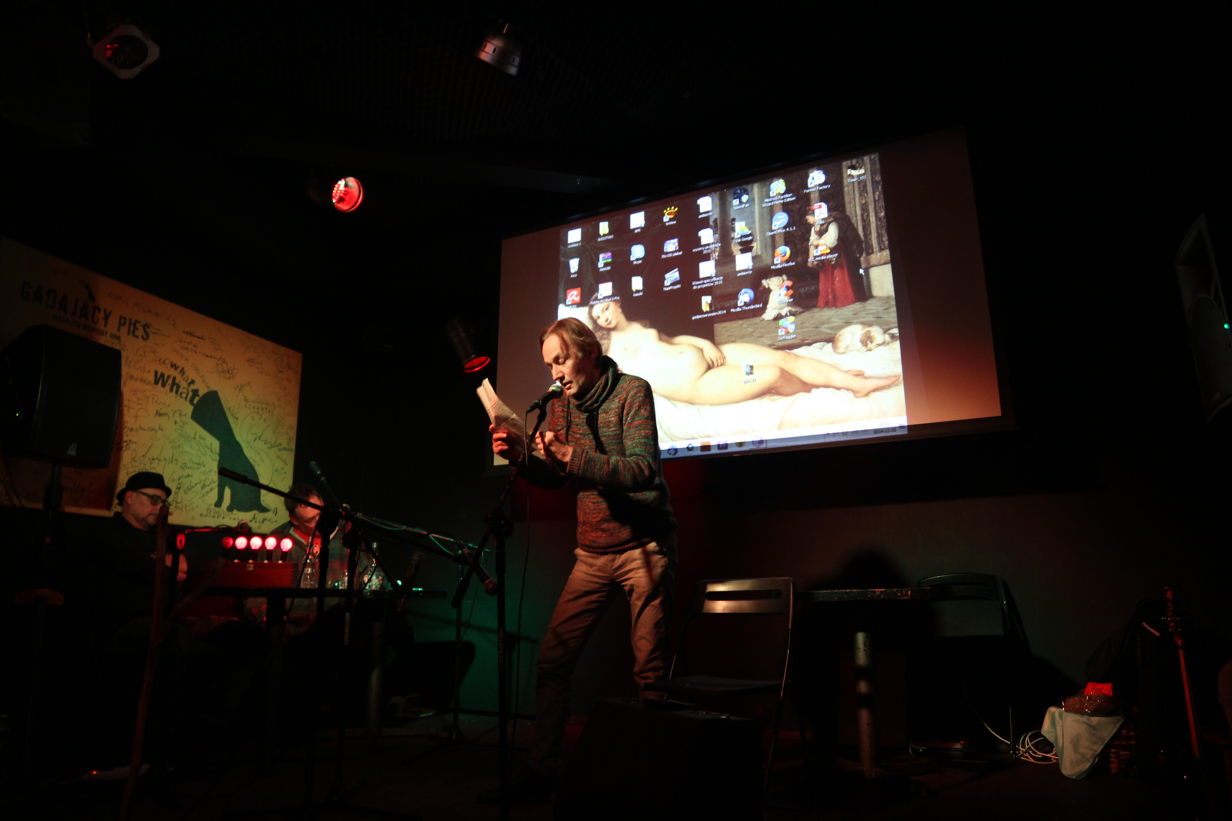 Filozof Piotr Bartula na scenie pisma mówionego "Gadający Pies".